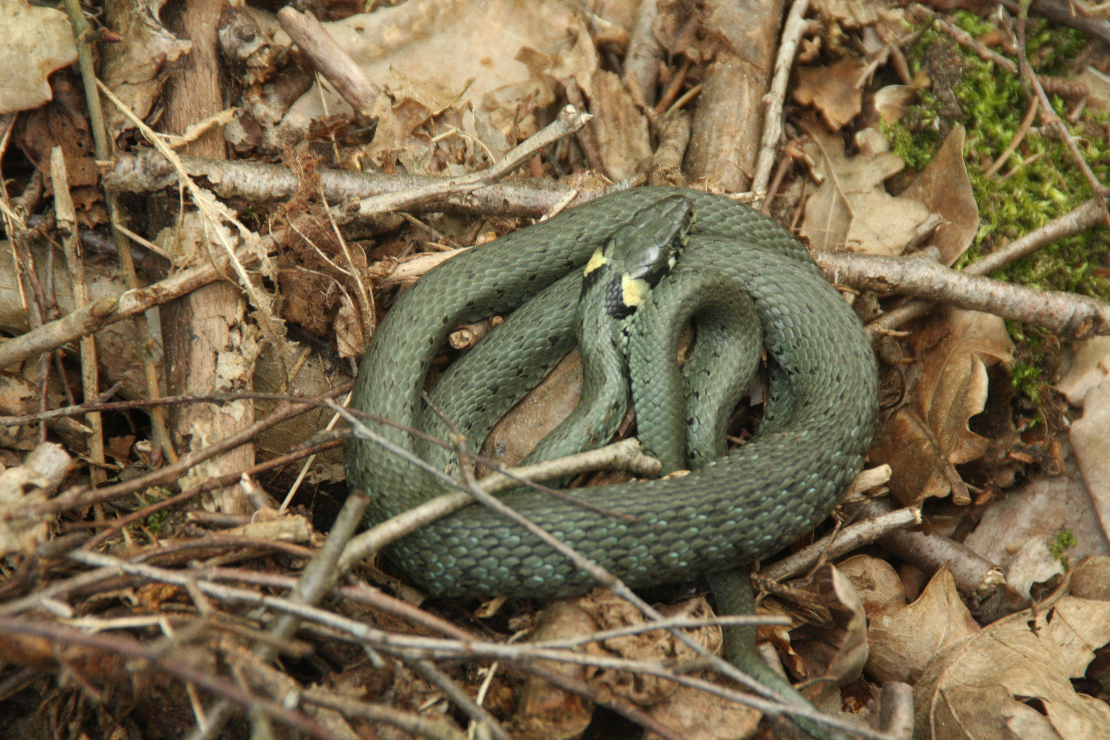 Nationalpark Unteres Odertal: Begegnung bei einem Waldspaziergang